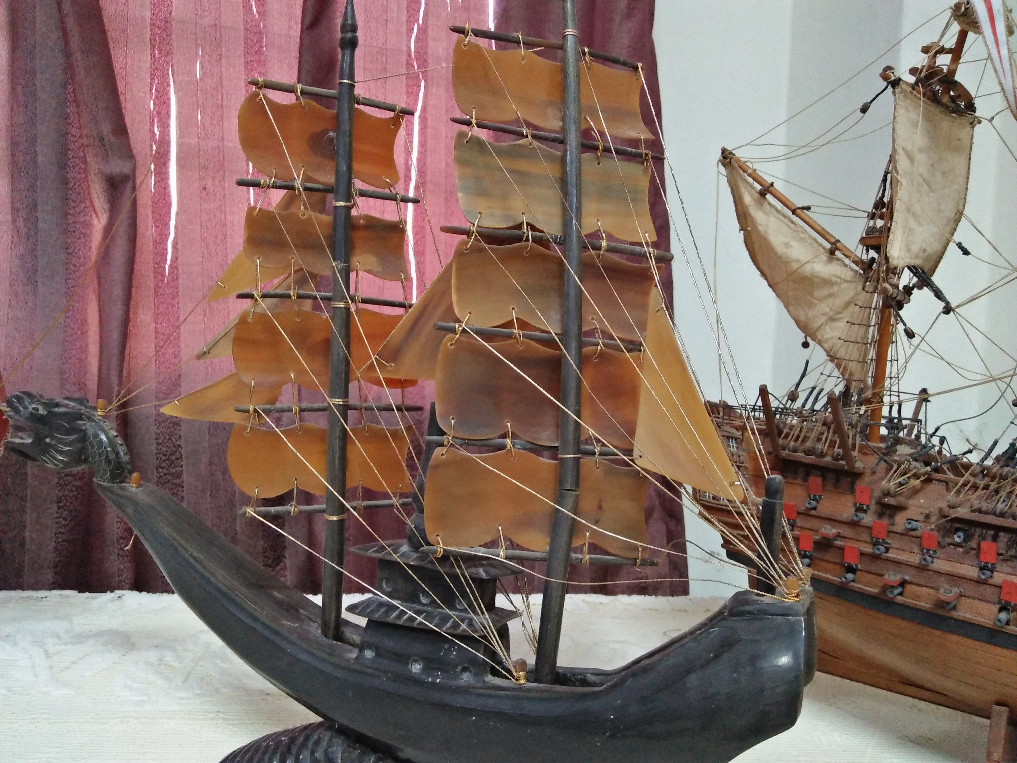 Kapal layar yang digunakan untuk aktiviti pelayaran yang diketuai oleh seorang nakhoda kapal dan dibantu oleh anak-anak kapal yang lain.